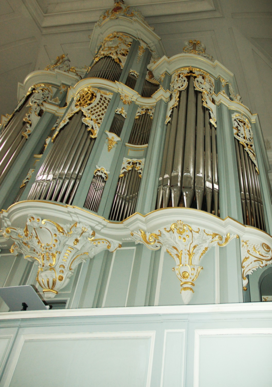 Wiegleborgel in der St. Gumbertuskirche Ansbach